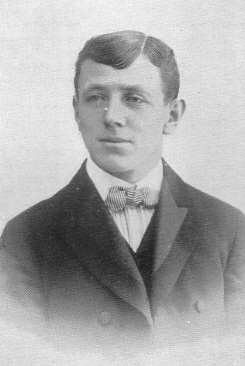 Jimmy Michael, cycliste britannique